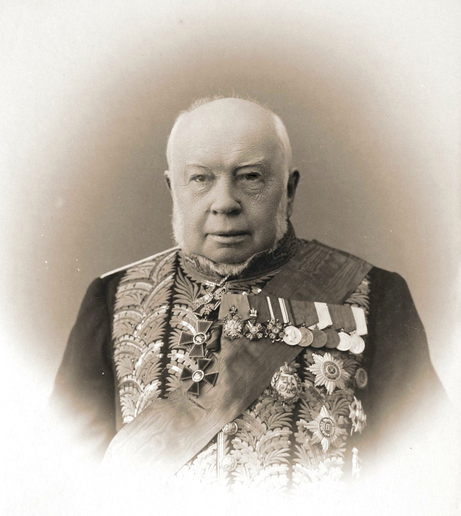 Стояновский, Николай Иванович